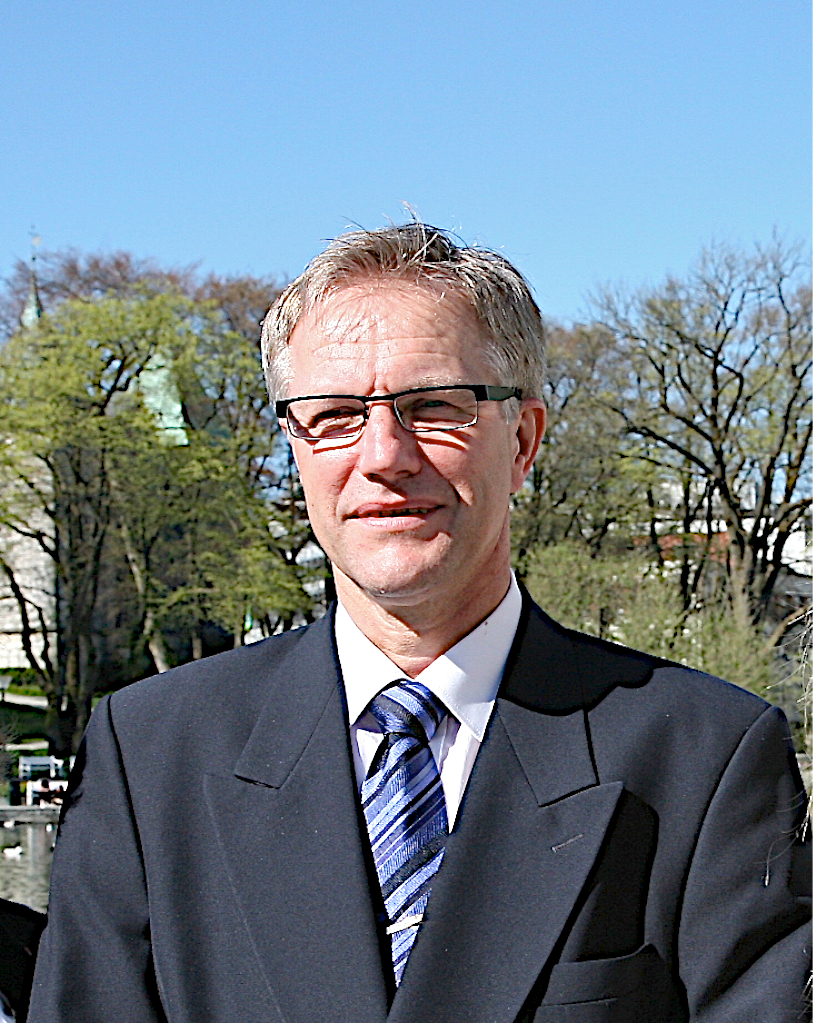 Harald Torfinn Thune